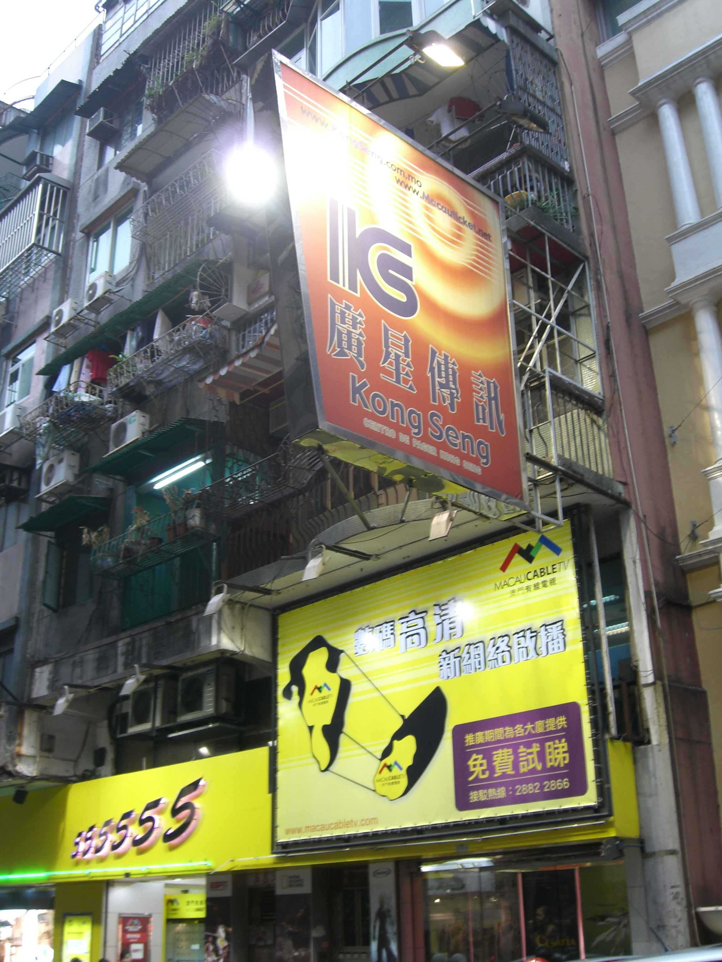 Kong Seng Paging Limited